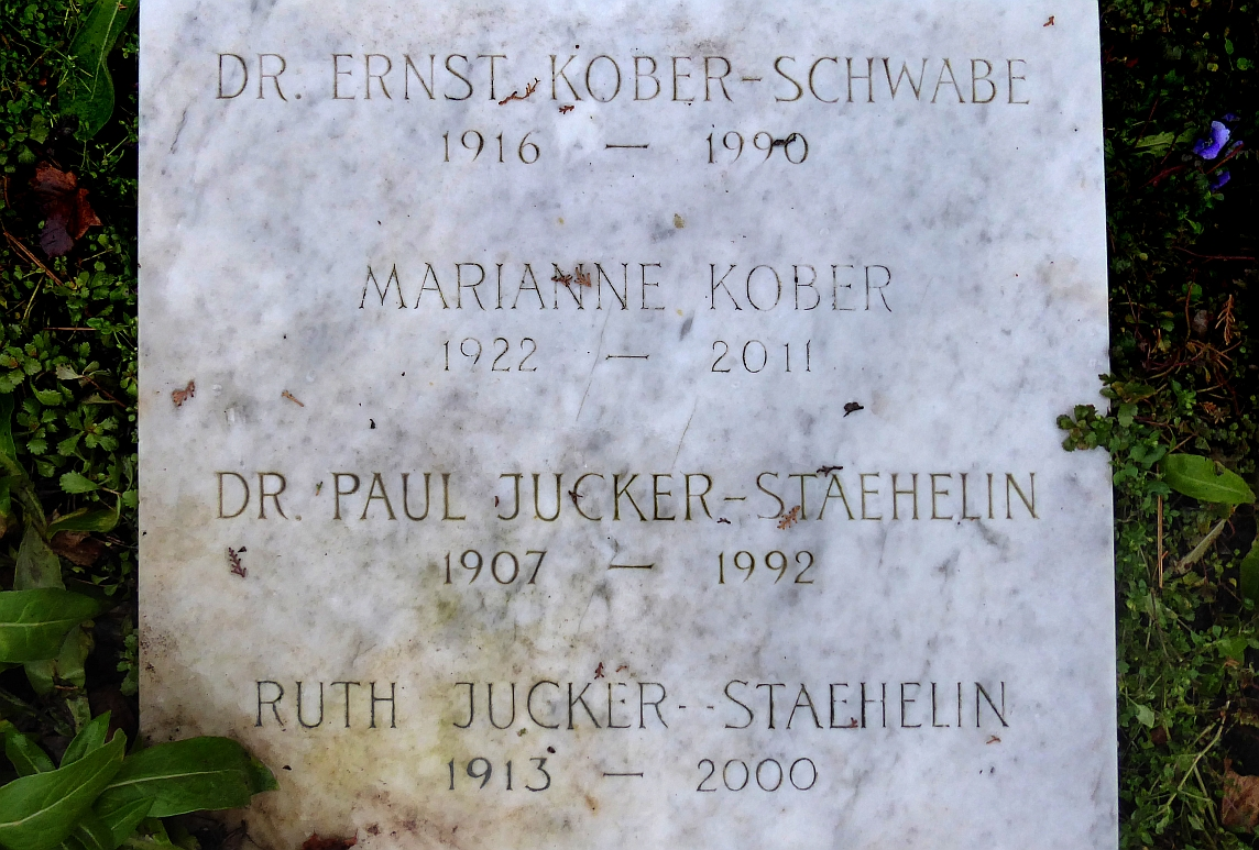 Paul Jucker-Stähelin (1907–1992) Dr.med Geriater, Grab auf dem Friedhof Wolfgottesacker, Basel. Familengrab: Stähelin-Clemens-Stockmayer-Kracht-Kober-Pfeifer-Schwabe-Jucker